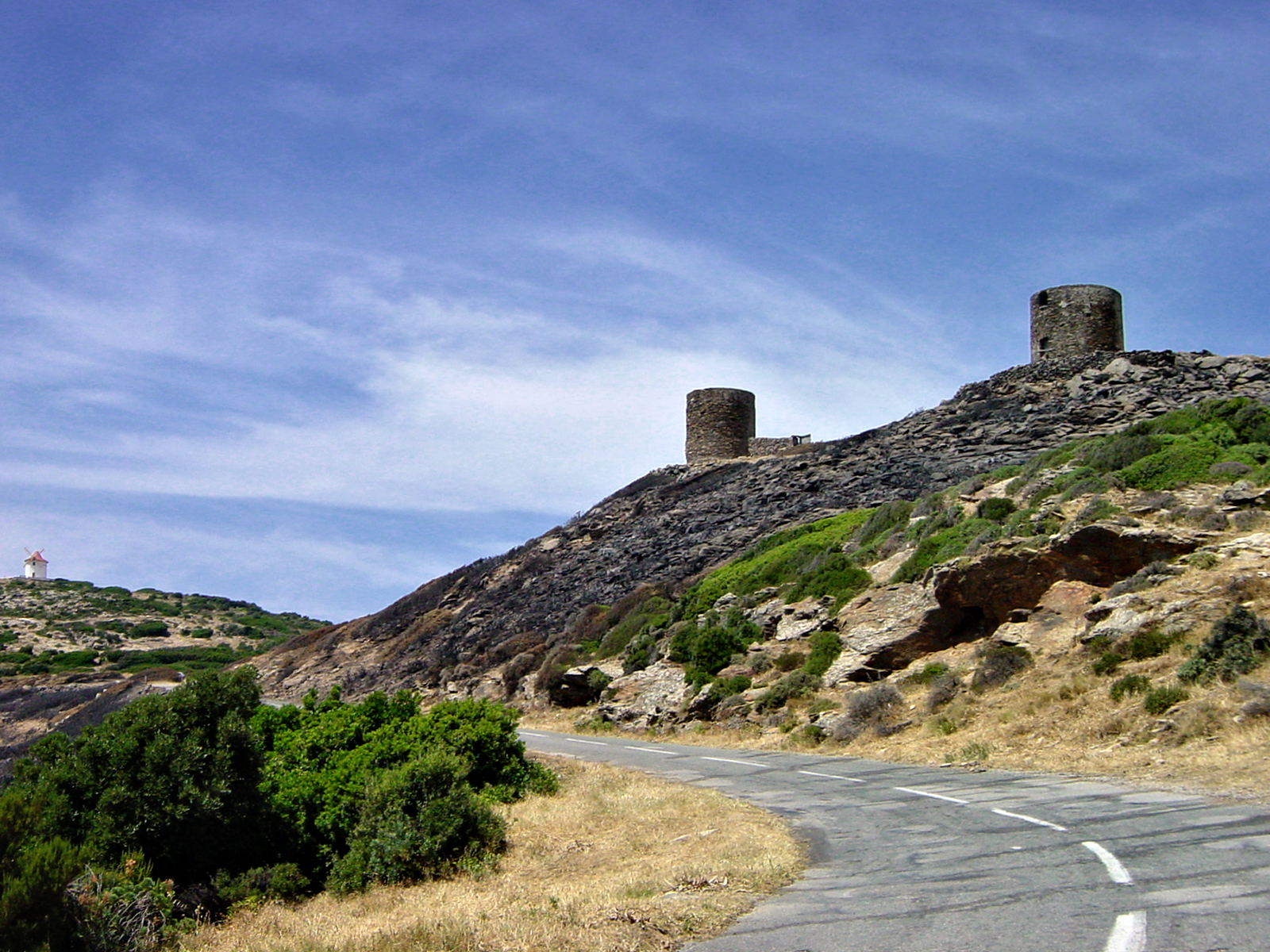 Ersa (Corsica) - Anciens moulins à Bocca de la Serra